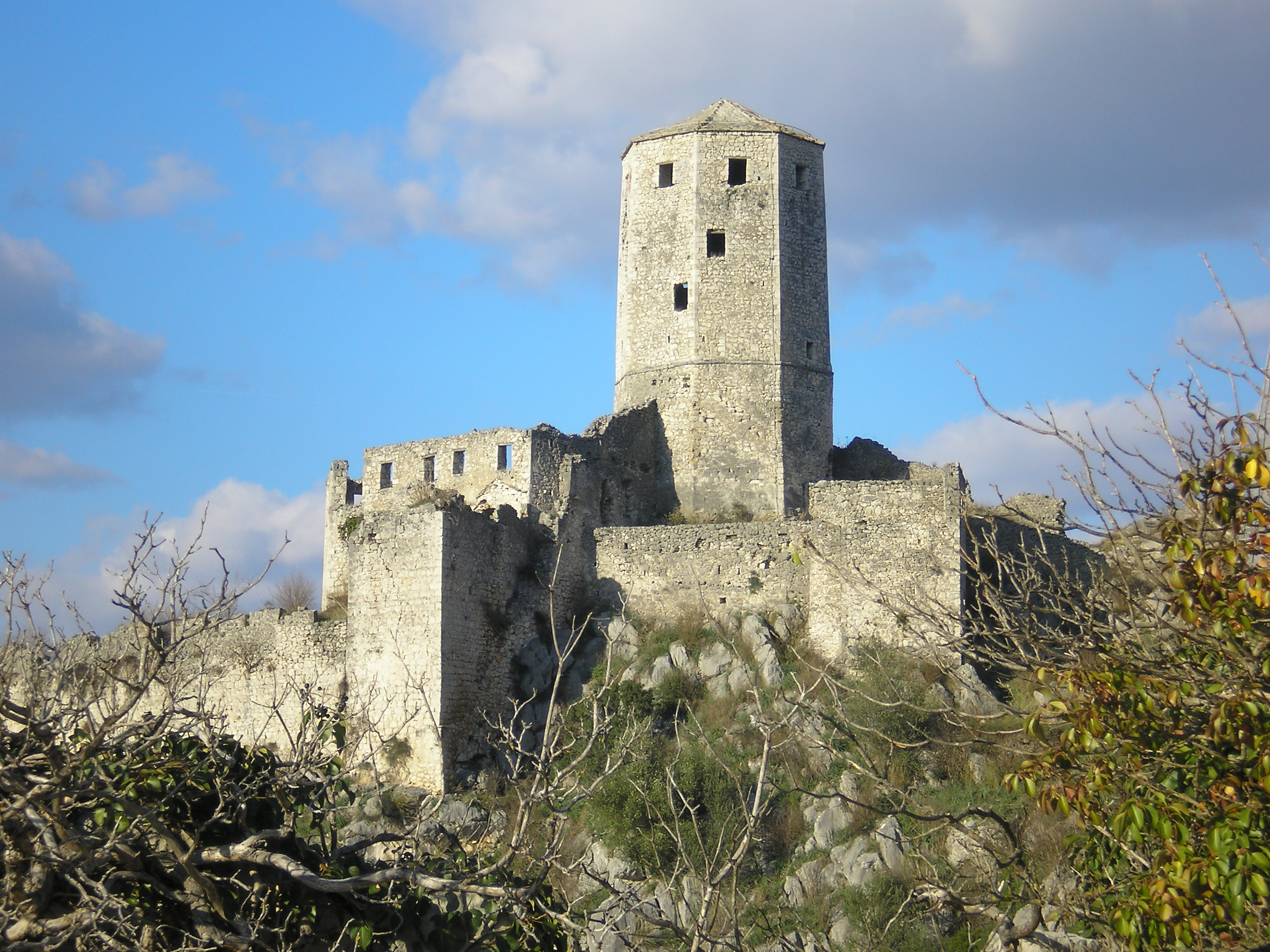 Festung von Počitelj, Bosnien-Herzegowina.